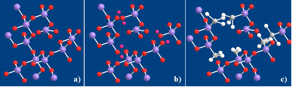 a) Verre de silice, b) Verre de silice élaboré à haute température en présence d’un fondant (Na2O), c) Verre de silice élaboré par sol-gel à partir de methyltriéthoxysilane. Auteur : Frédéric Chaput, réalisé avec un programme de dessin. Licence GFDL Frédéric Chaput